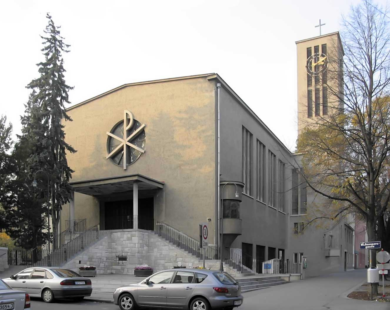 Kirche St. Leopold, Sandleiten